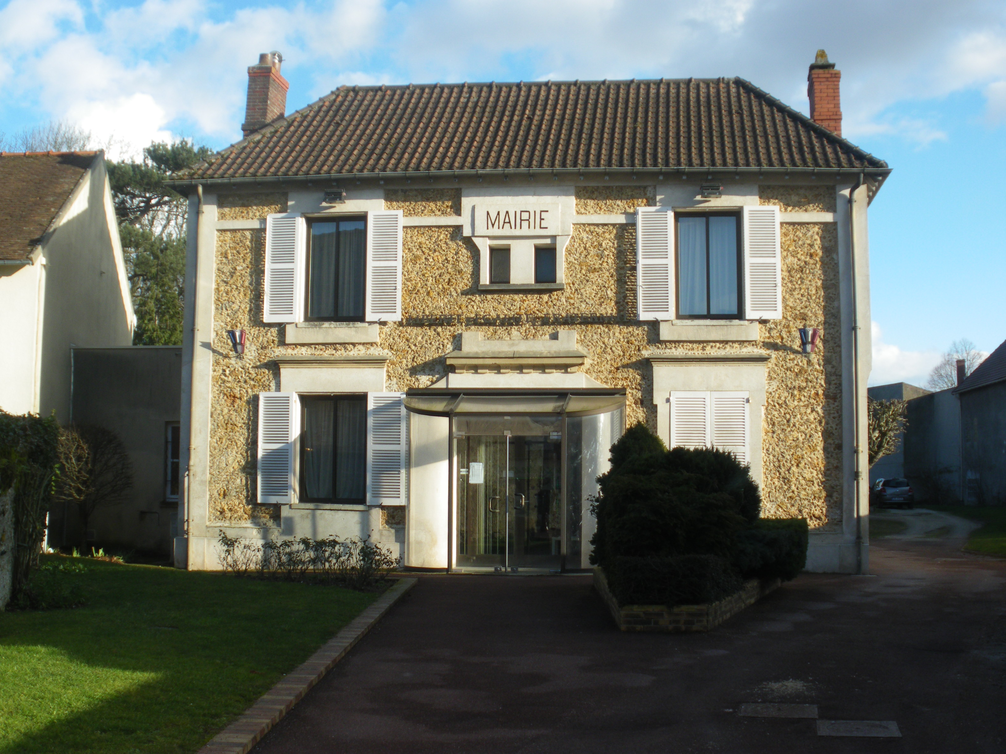 Mairie des Molières